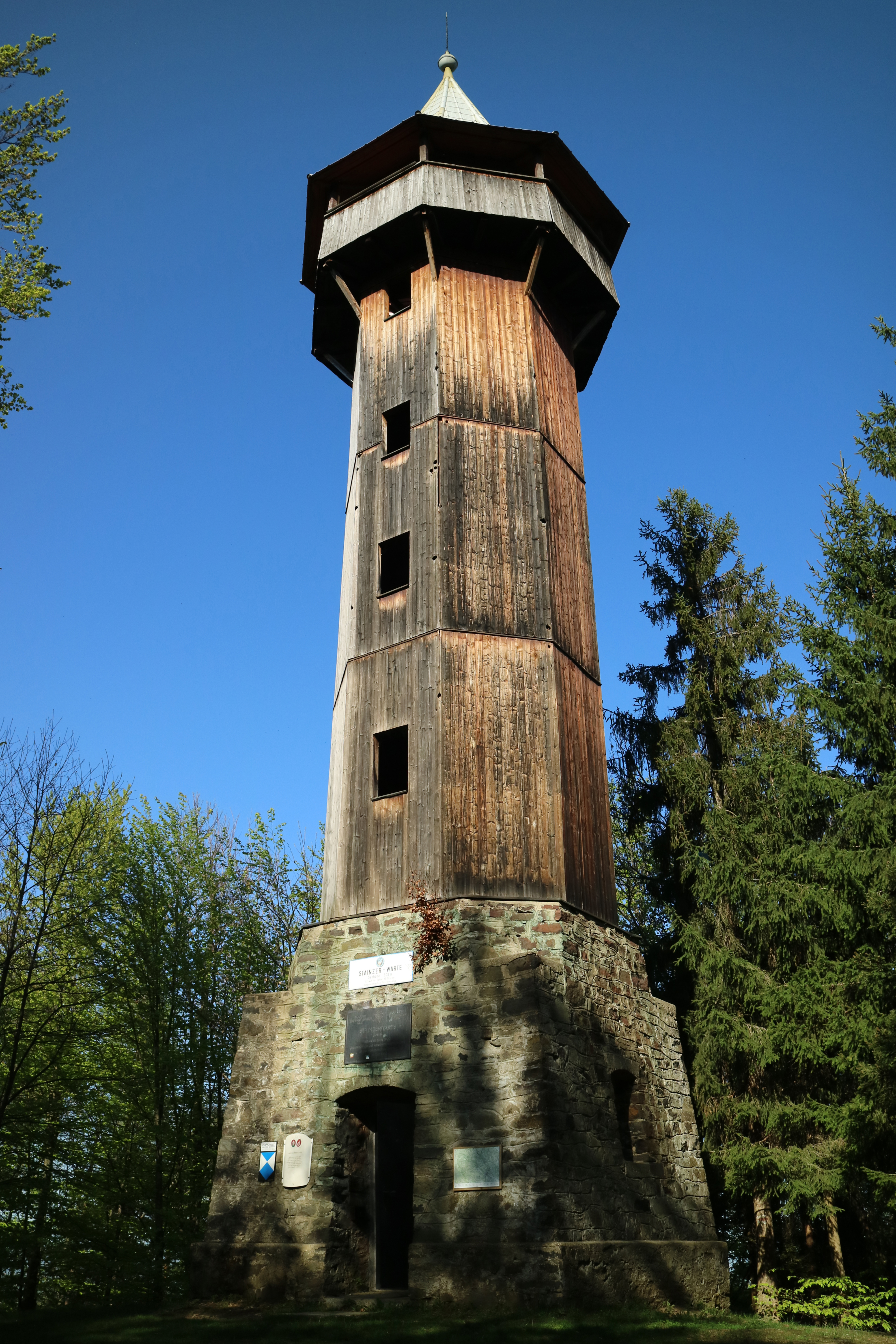 Stainzer Warte am Lethkogel, Marktgemeinde Stainz (Steiermark)